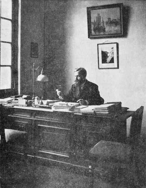 Emmanuel de Martonne, (1873-1955) est un géographe français.